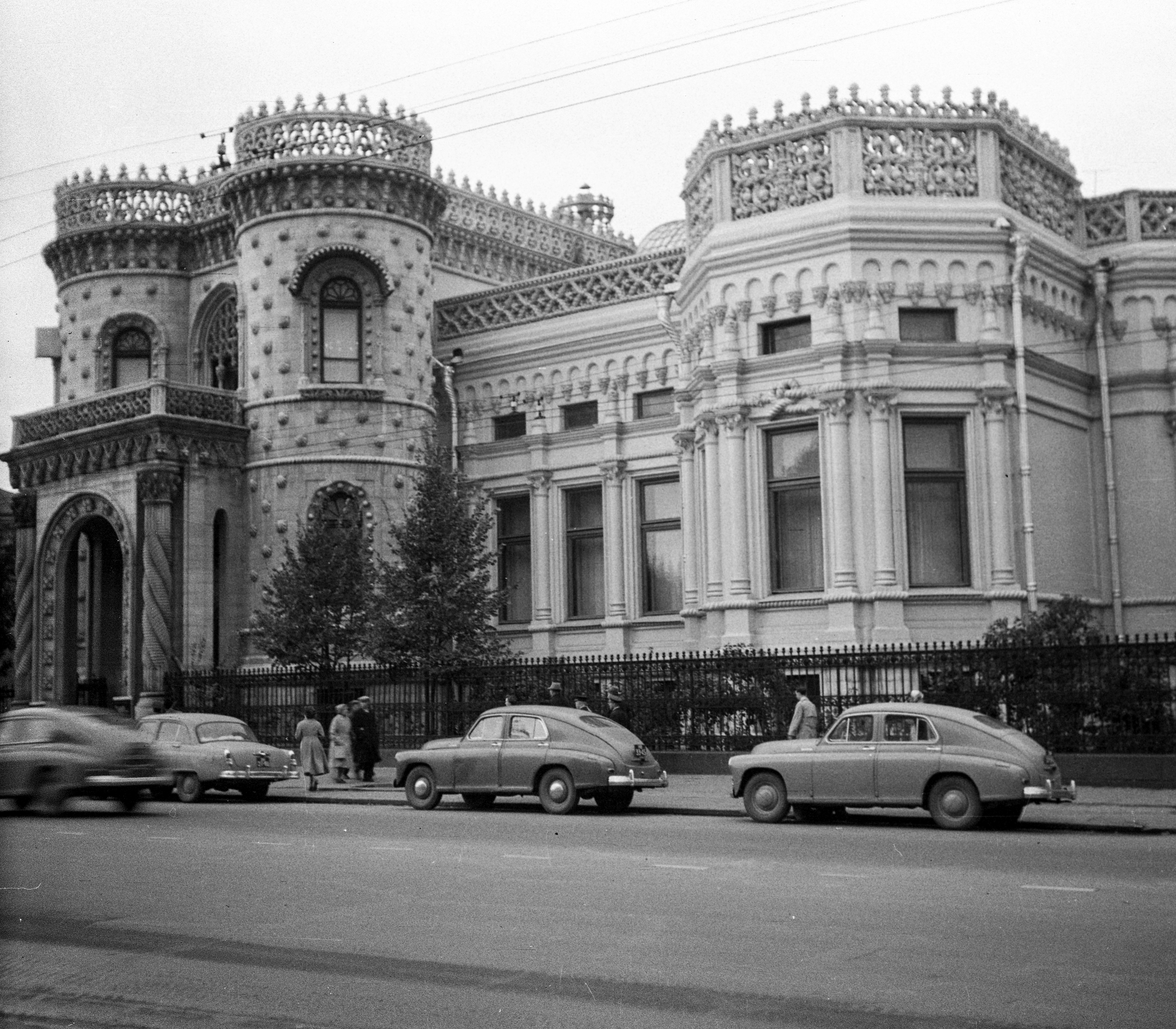 Vozdvizsenyka utca 16., Arszenij Morozov egykori palotája. A Monserrate palota (Portugália, Sintra) mintájára épült 1895 és 1899 között. Location: Russia, Moscow Tags: Soviet Union, palace, Neo-Manueline architecture Title: Vozdvizsenyka utca 16., Arszenij Morozov egykori palotája. A Monserrate palota (Portugália, Sintra) mintájára épült 1895 és 1899 között.